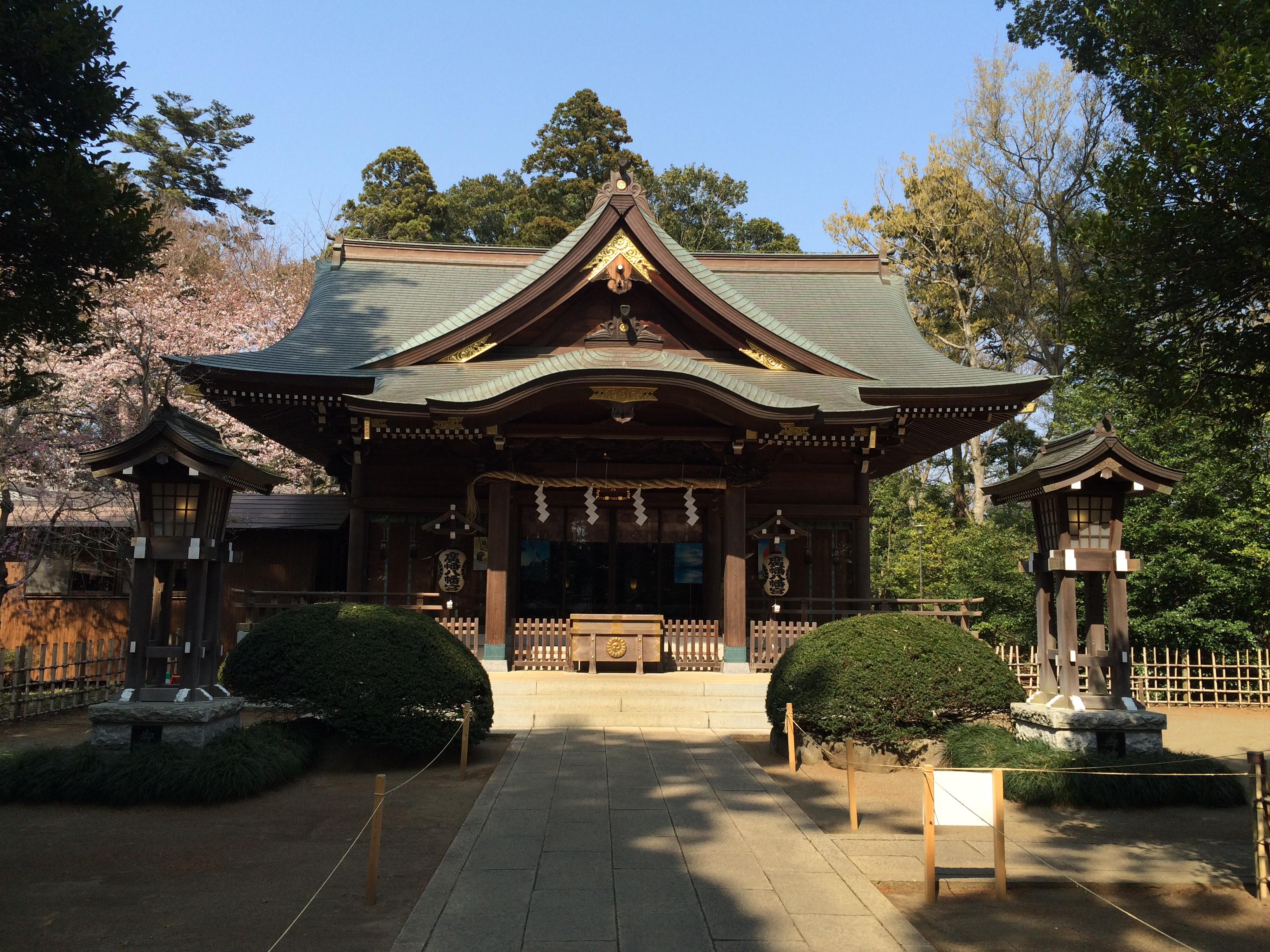 廣幡八幡宮神社